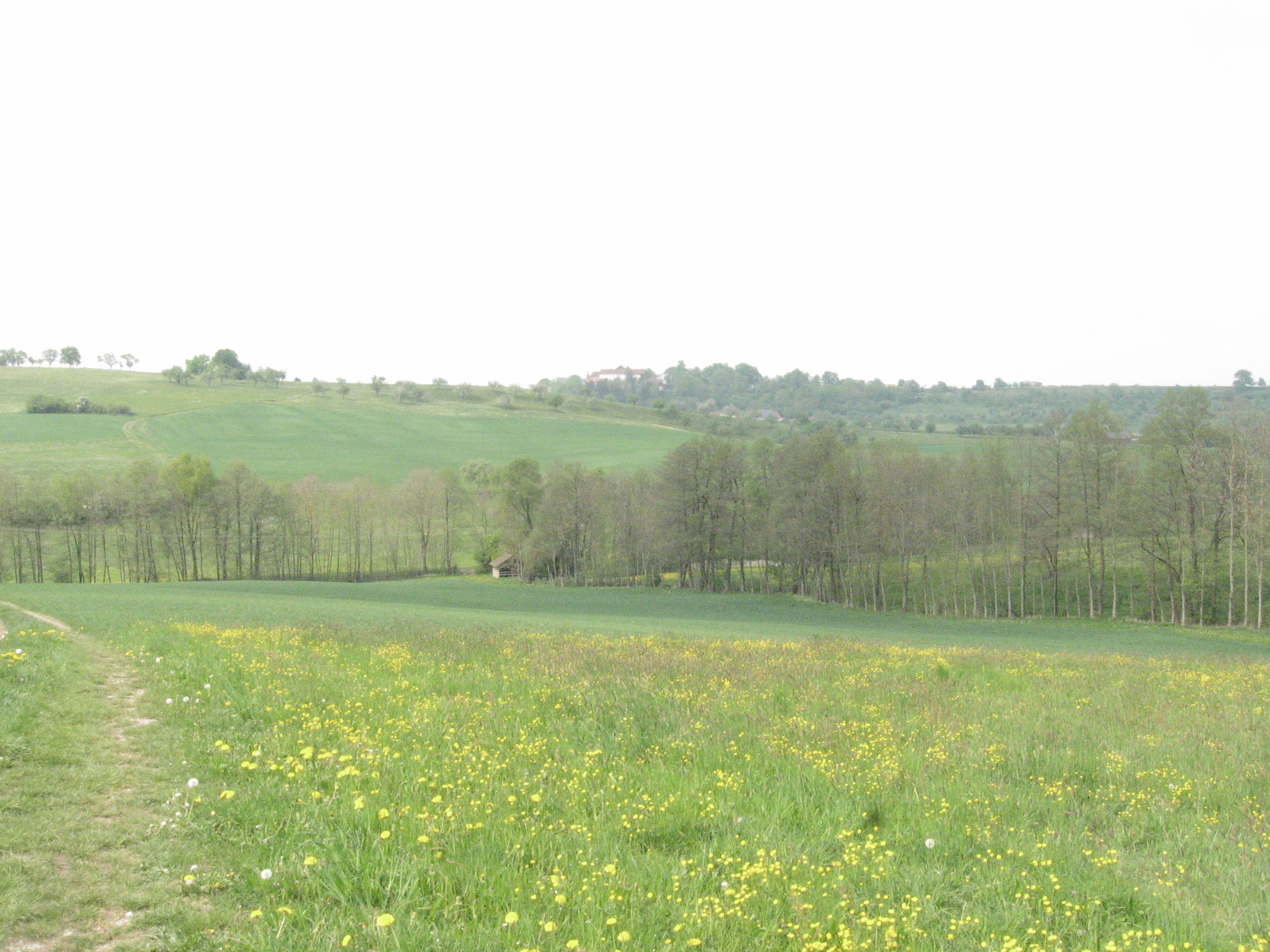 Blick nach Norden über den Sperberklingenbach (von rechts) und seine Mündung in den Avenbach auf den oberen Laberich (rechter Talhang des unteren Avenbachtals) und die Bühlertanner Tannenburg dahinter und darüber.